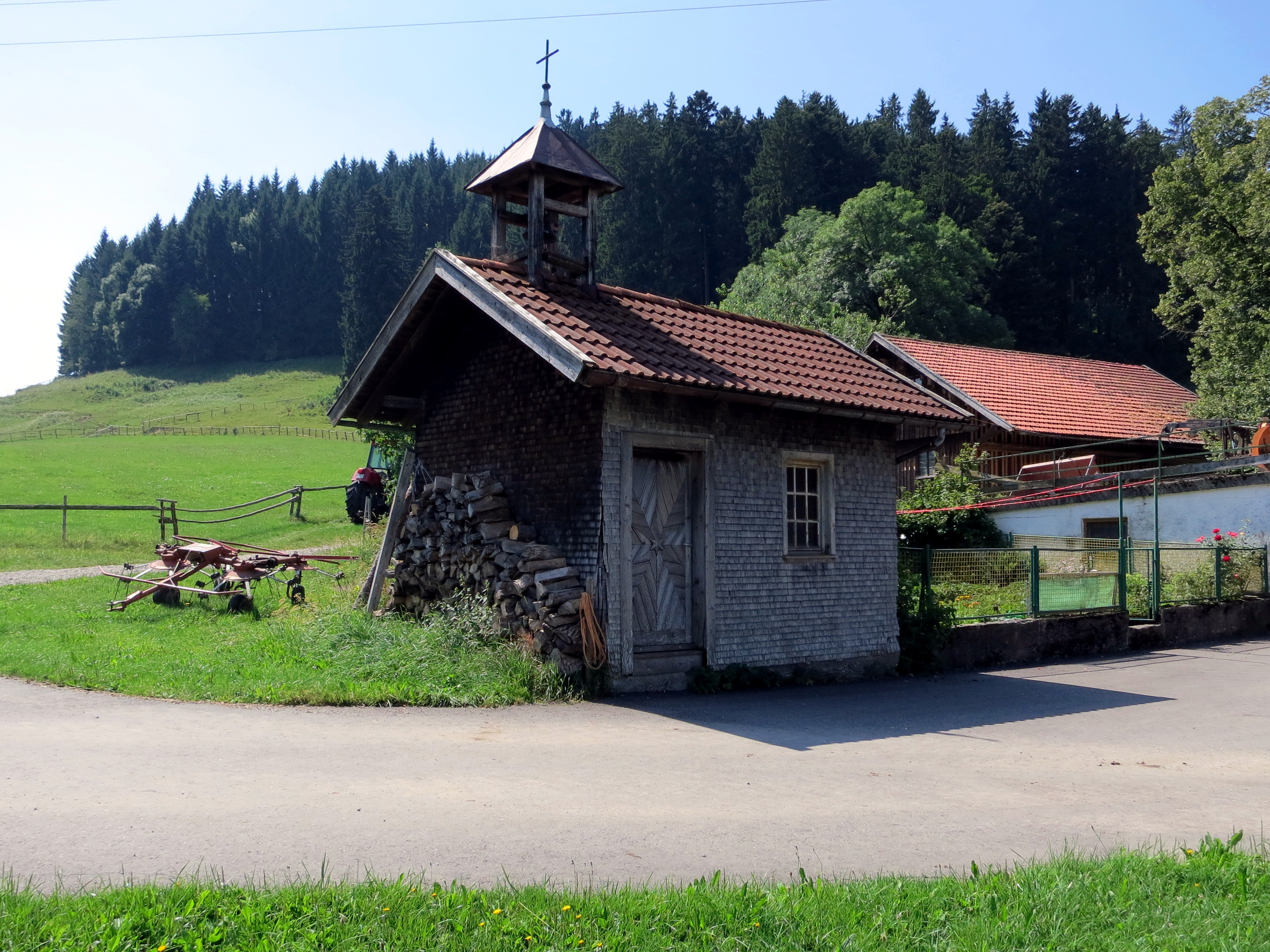 Kapelle beim Haus Blenden 3 - Denkmal D-7-80-146-4